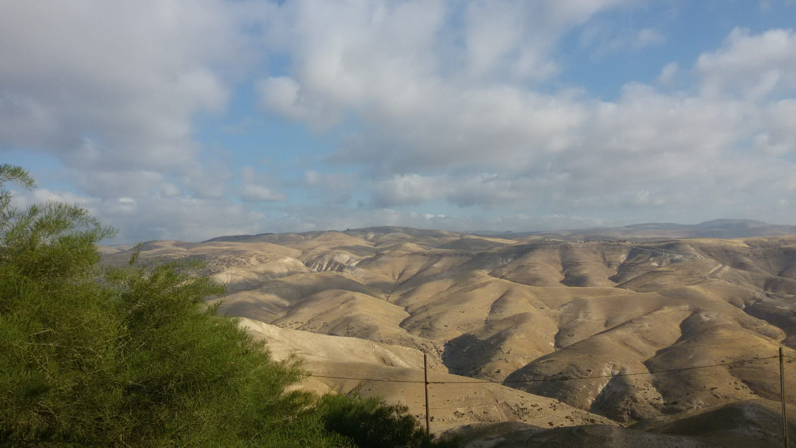 ספר המדבר. מבט על מדבר יהודה מכפר אדומים